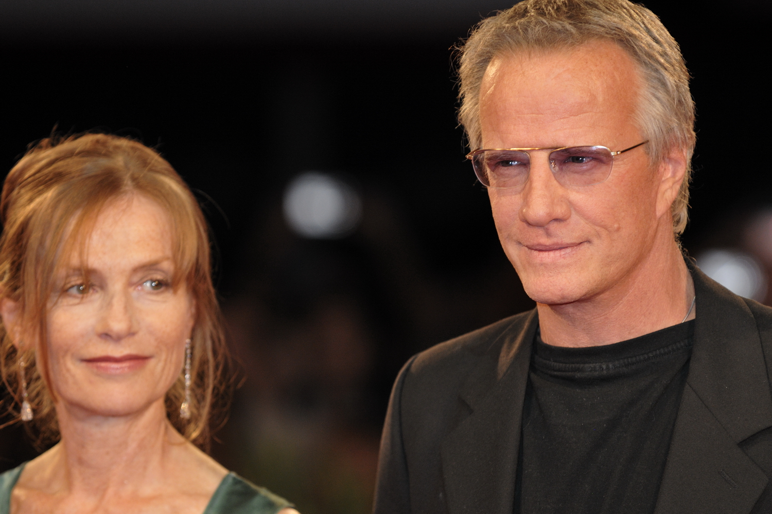 66ème Festival du Cinéma de Venise (Mostra), 5ème jour (06/09/2009) Tapis Rouge avec Christophe Lambert, Isabelle Huppert et Patrice Chéreau pour le film en compétition : White Material